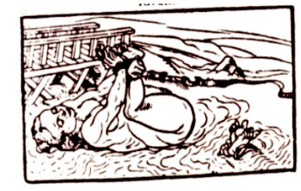 Titelblattausschnitt aus dem Hexentraktat: Hermann Neuwalt, Bericht von Erforschung / Probe und Erkenntnis der Zauberinnen durchs kalte Wasser [...], Helmstadt 1584. (Nach einer Mikrofiche-Aufnahme der Universitätsbibliothek Marburg.) Urheberrechtlich dürfte es keine Bedenken geben. Diana 23:17, 13. Dez 2003 (CET)